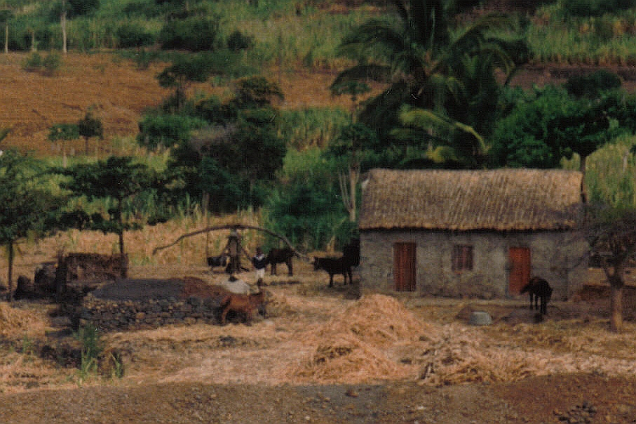 Trapiche (traditional sugar mill) in Ribeira da Cruz, Santo Antão Island, Cape Verde